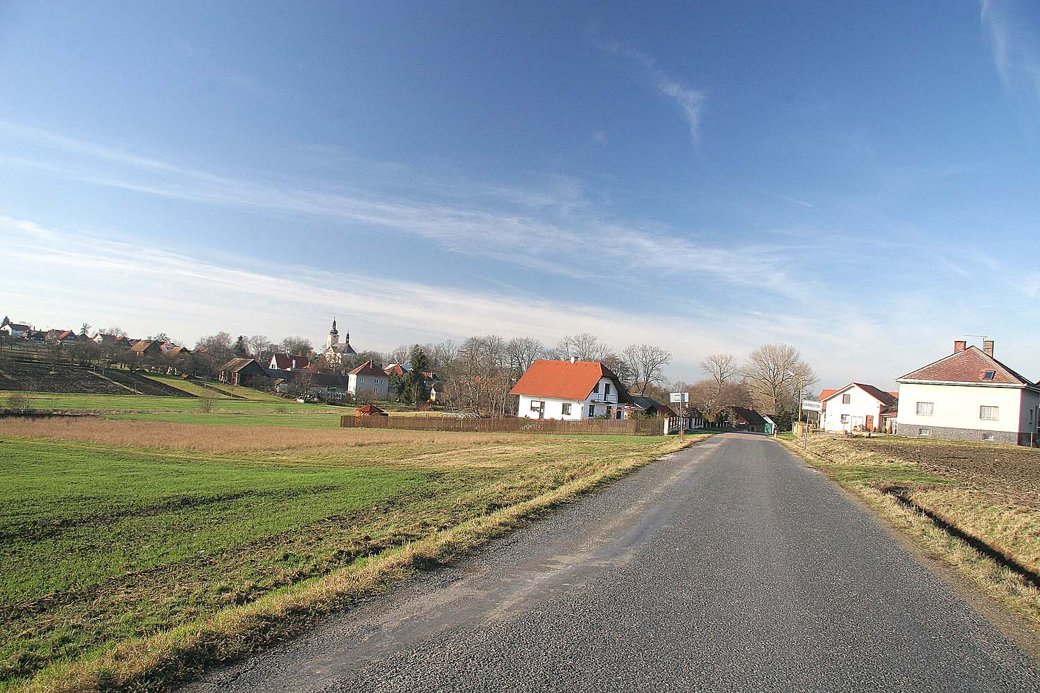 Pohled na Chroustov ze silnice od Dvořiště. District Nymburk autor:Prazak date: 15. 1. 2007